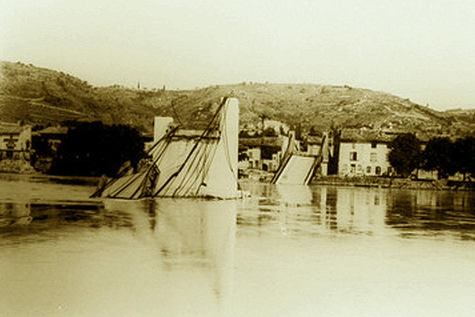 Pont sur le Rhône entre Condrieu et Les Roches-de-Condrieu a été inauguré le 11 juillet 1937 par Laurent Bonnevay en présence d'Edouard Herriot et il a été détruit le 20 juin 1940 à 11h